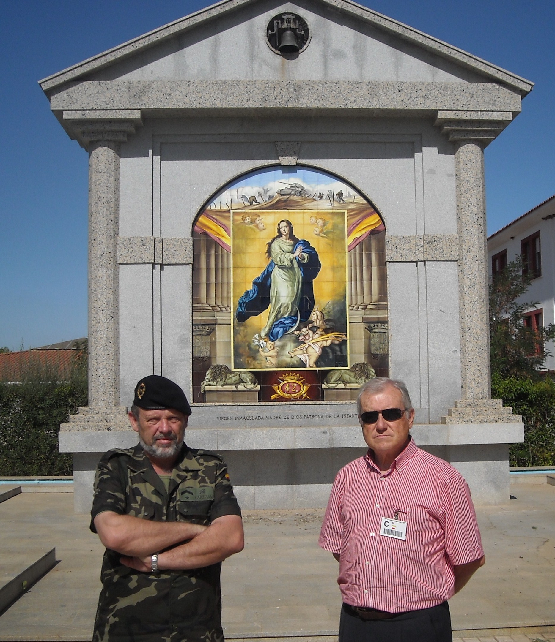 Monumento a la Inmaculada Concepción, Patrona de la Infantería Española en la Base General Menacho. Botoa